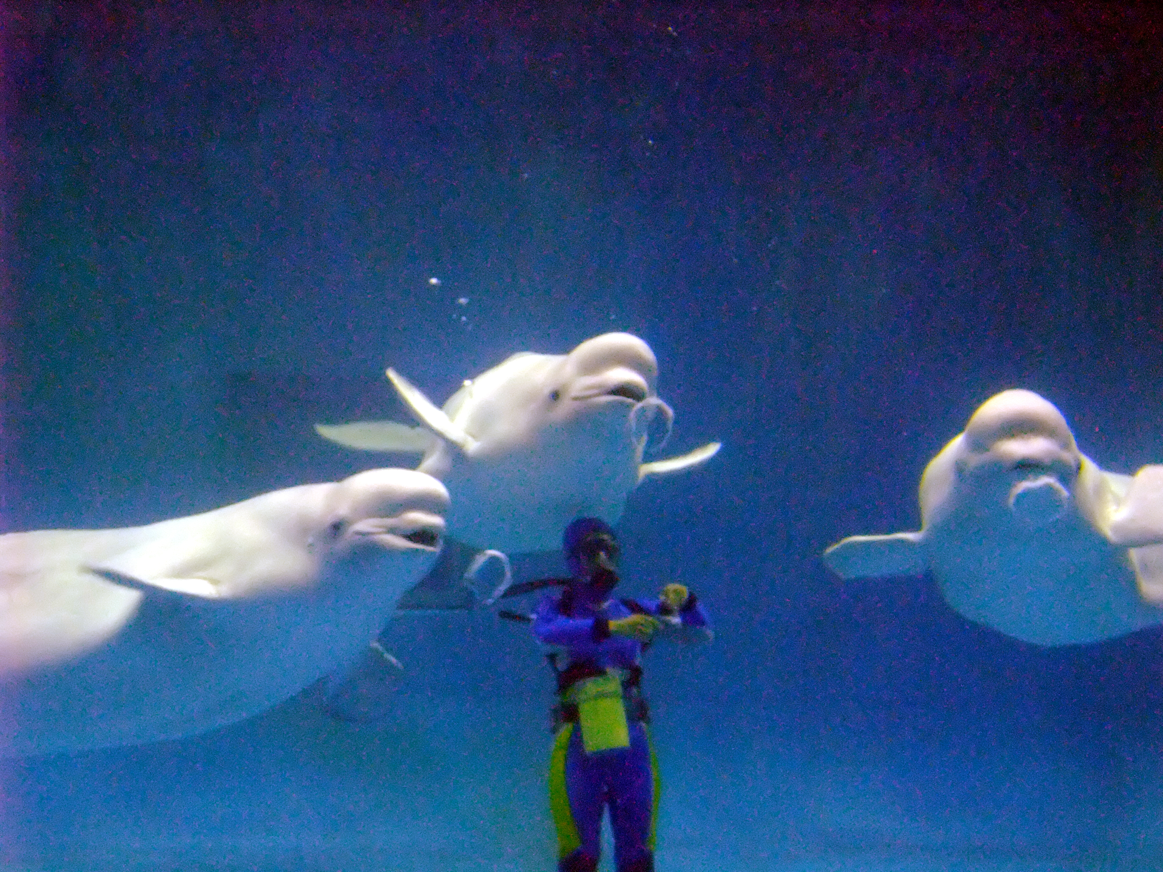 島根海洋館アクアスにて 幸せのバブルリング